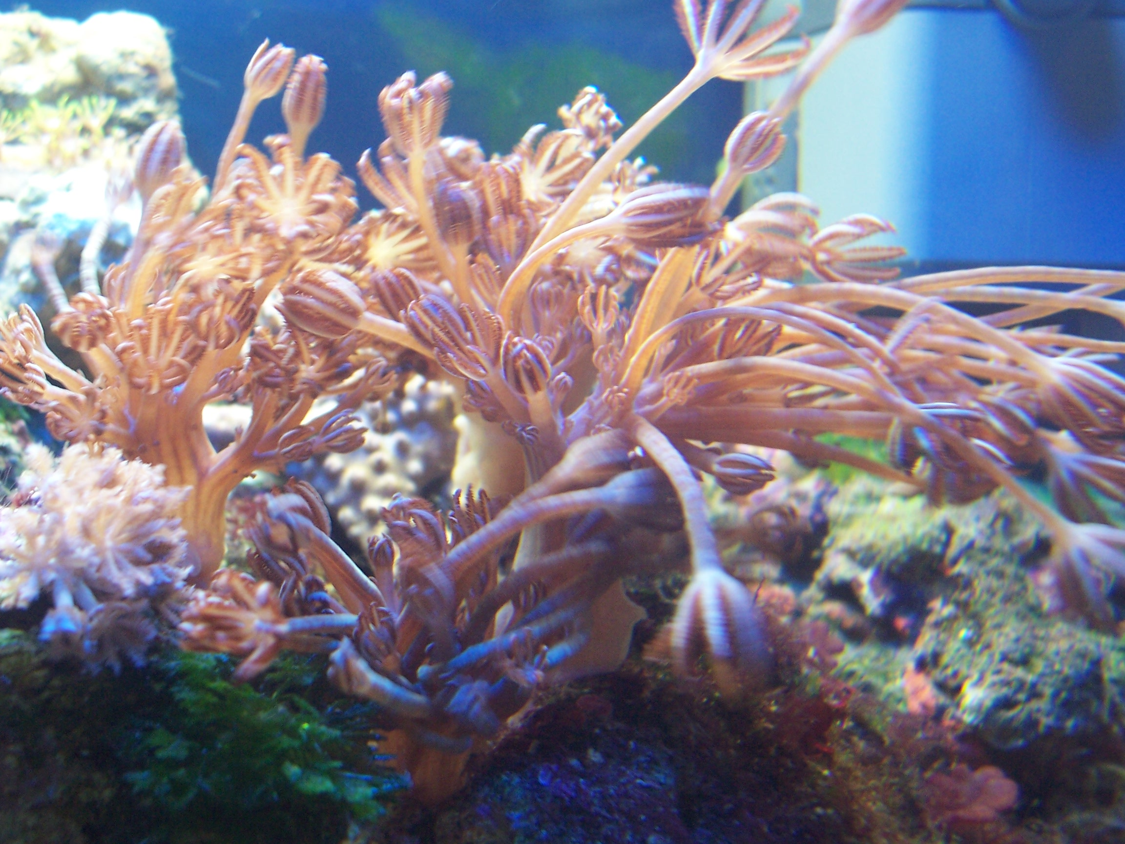 Panorama di un acquario di barriera NanoReef con invertebrati. Nota: foto amatoriale presente sul sito acquanandi, di mia proprietà.